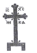 Изображение на Борисовом камне у Дисны.